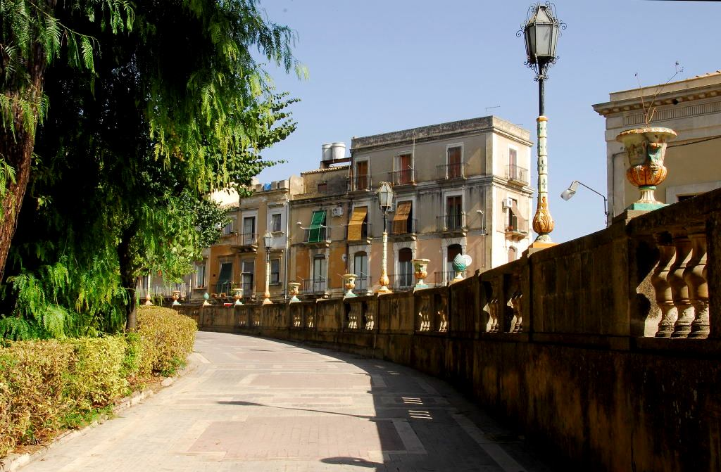 Caltagirone, ITA